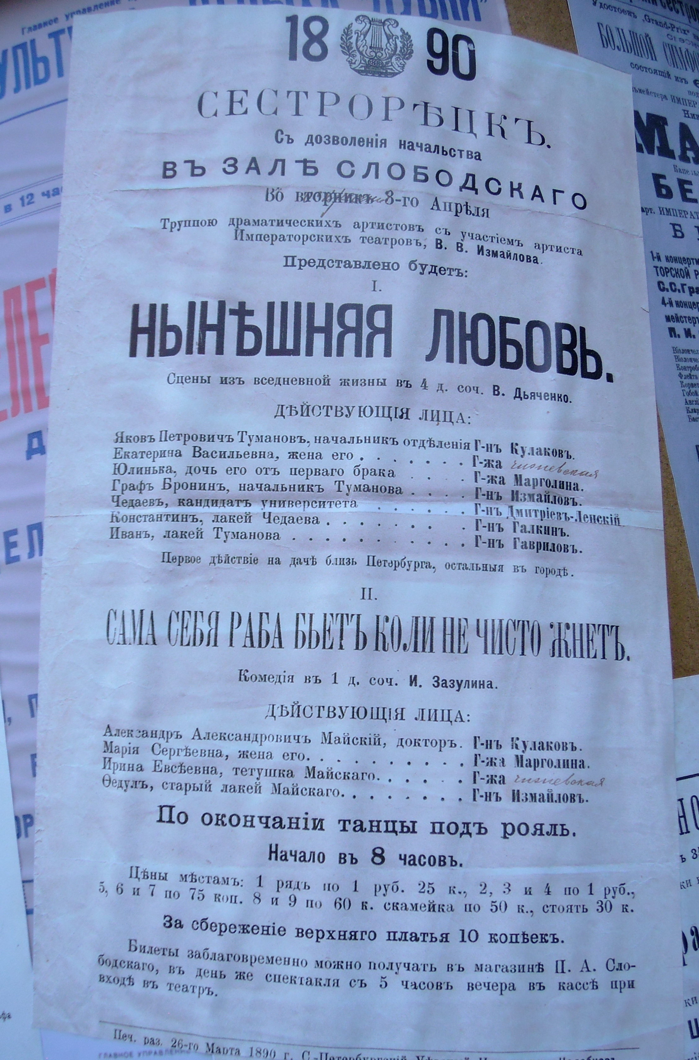 Афиша театра Слободского в Сестрорецке на углу улицы Выборгской и Никольского переулка нынешний адрес ул. Володарского дом 4